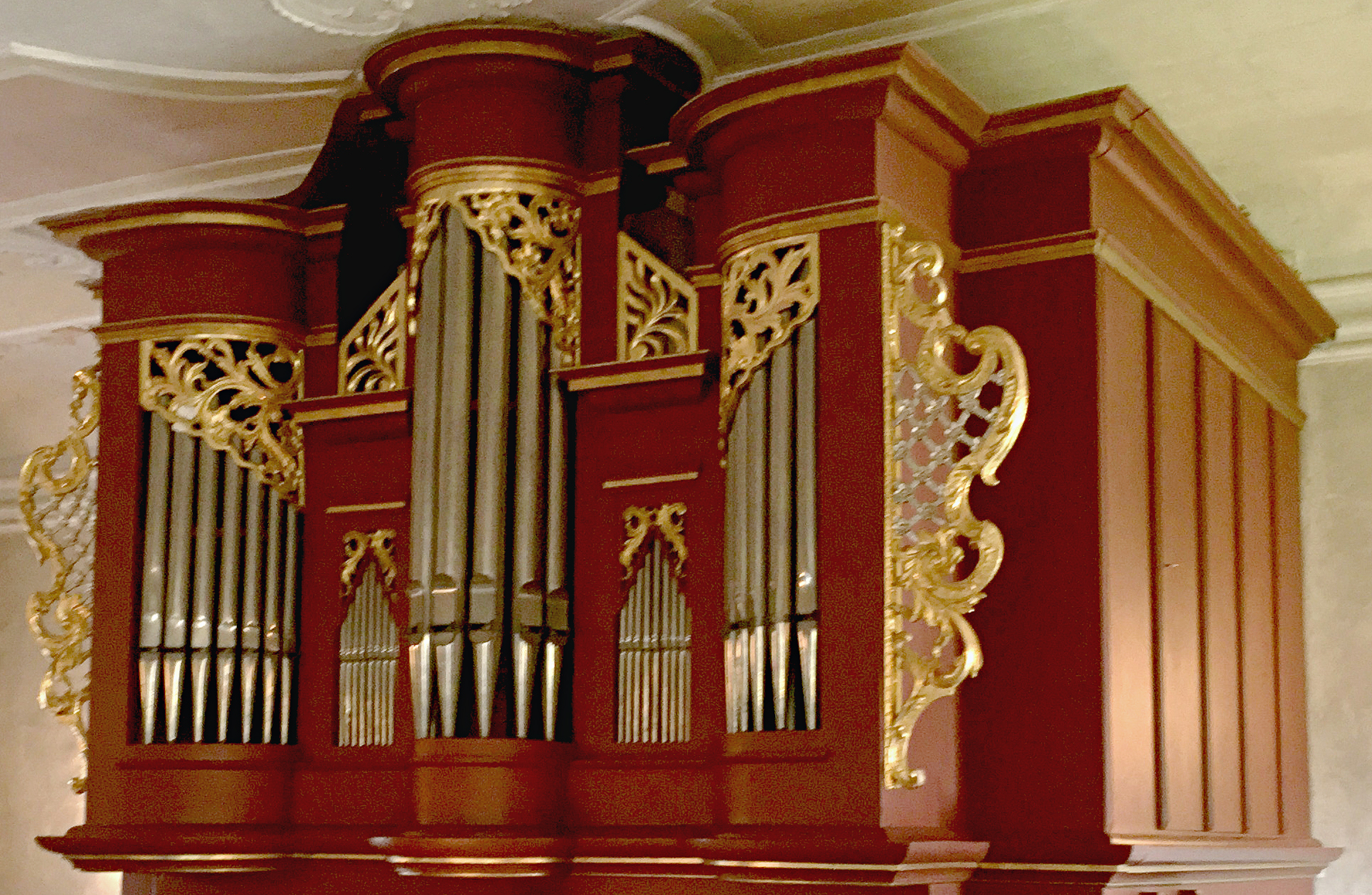 Prospekt der 1906 errichteten Strebel-Orgel (13 klingende Register) in der evang.-luth. St. Jakob & St. Erhard Kirche in Rugendorf